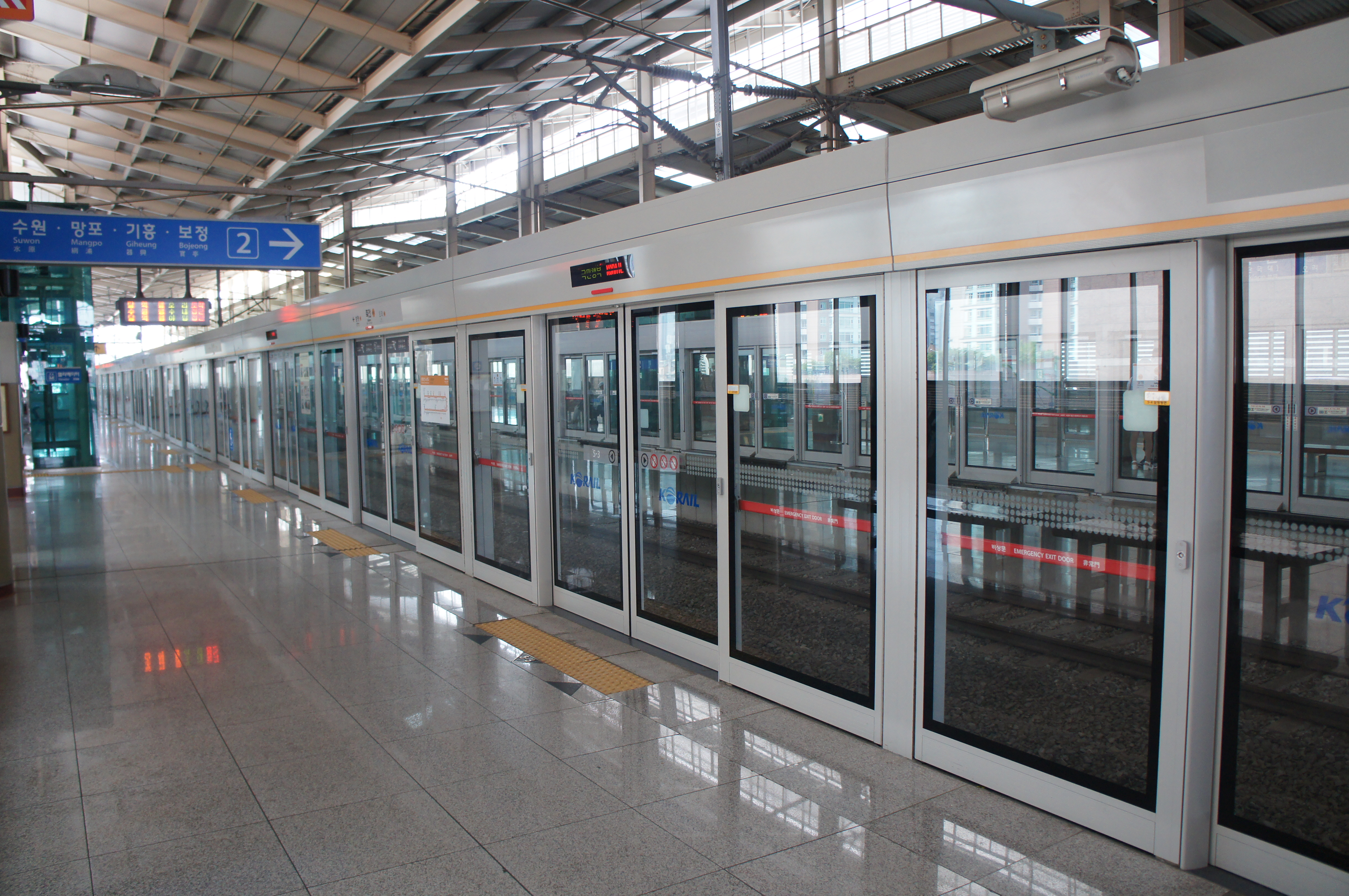 죽전역 승강장